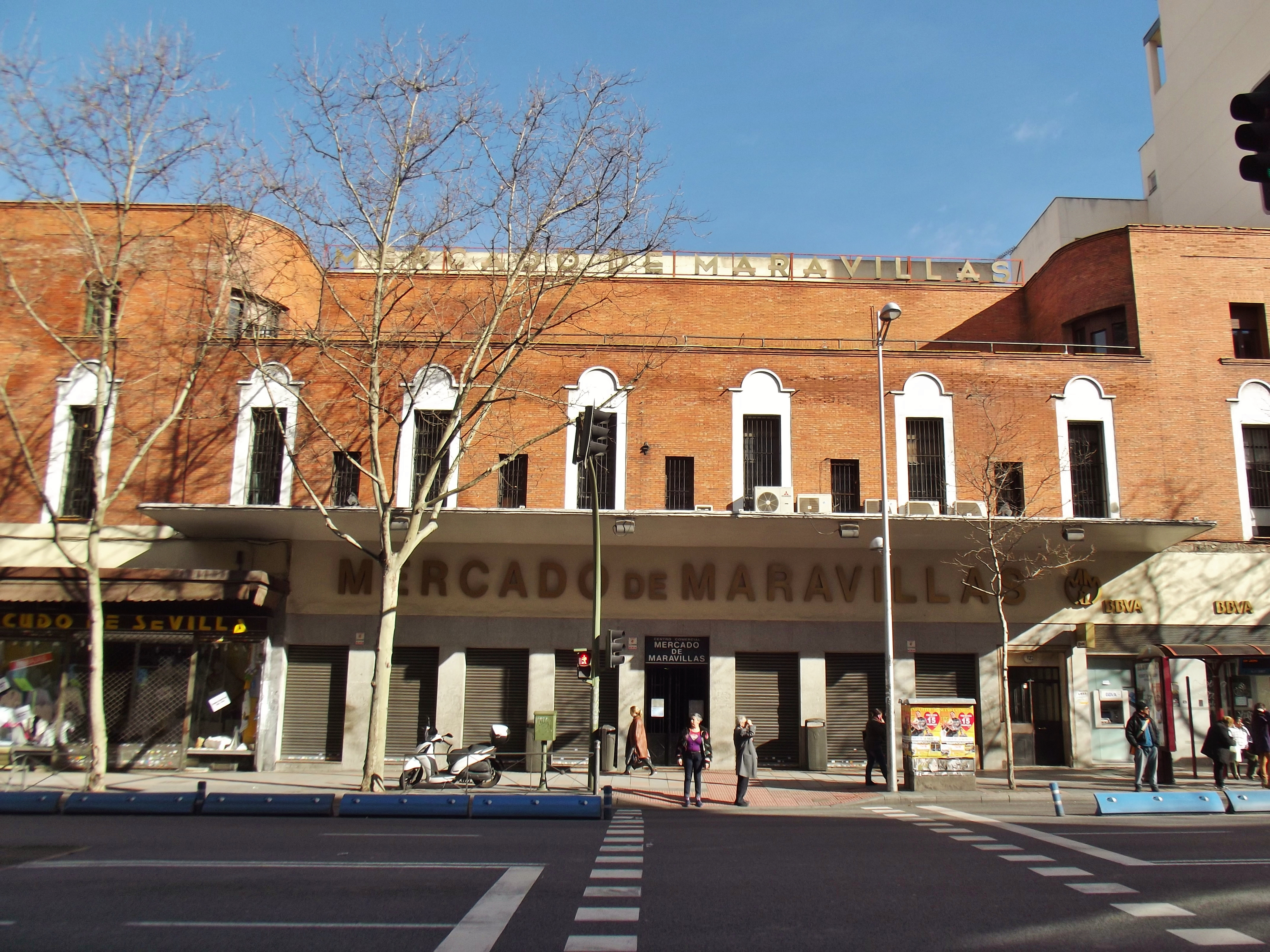 Mercado de Maravillas, Madrid.